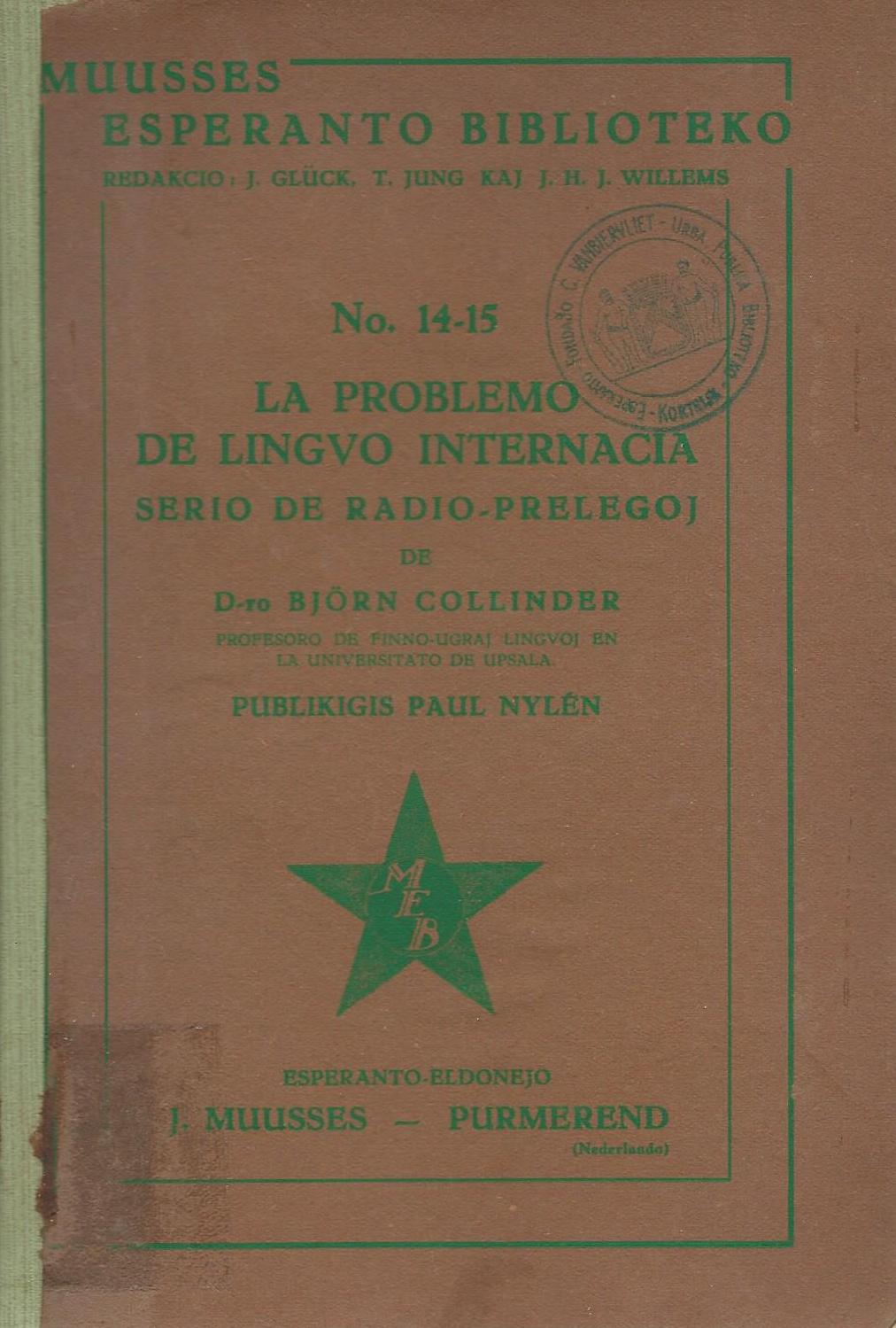 kovrilo de "La Problemo de Lingvo Internacia", 1938